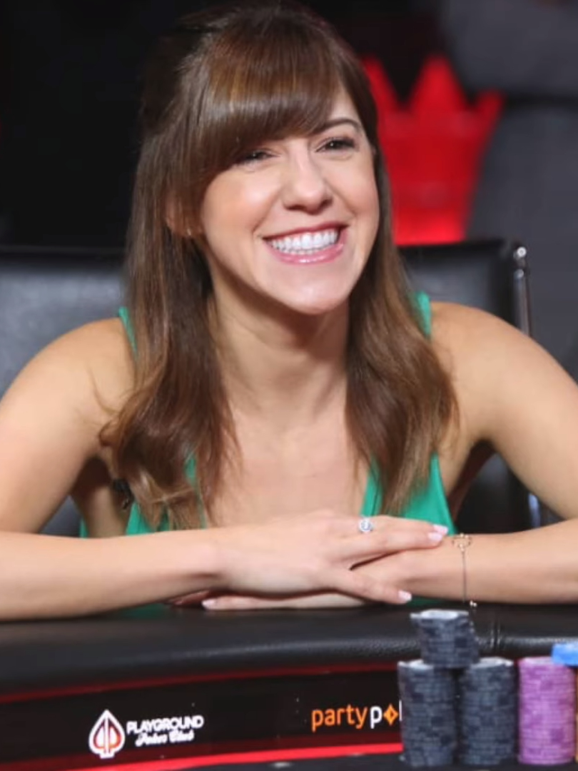 Kristen Bicknell bei den partypoker Millions North America